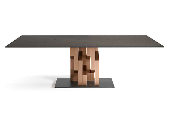 KIGHI